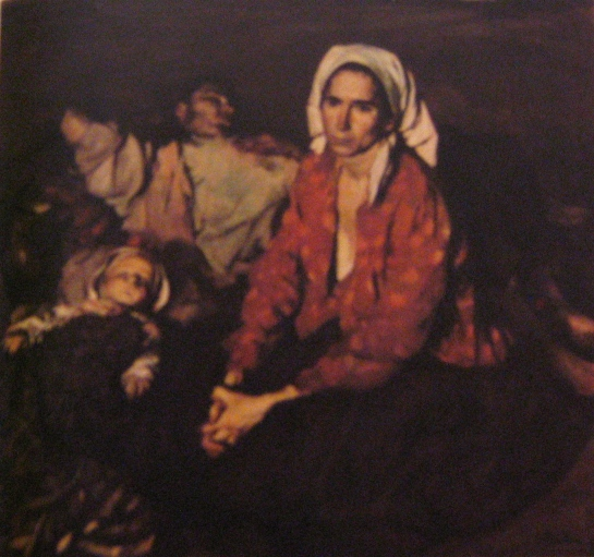 Corleniu Baba - Odihnă pe câmp